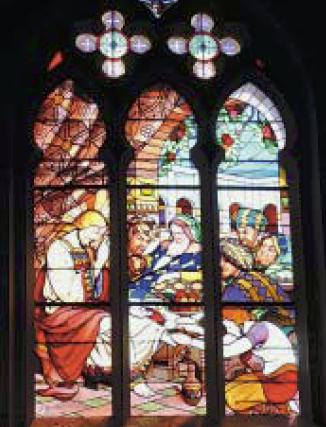 Vitrail de l'église de Genay d'Augustin Burlet